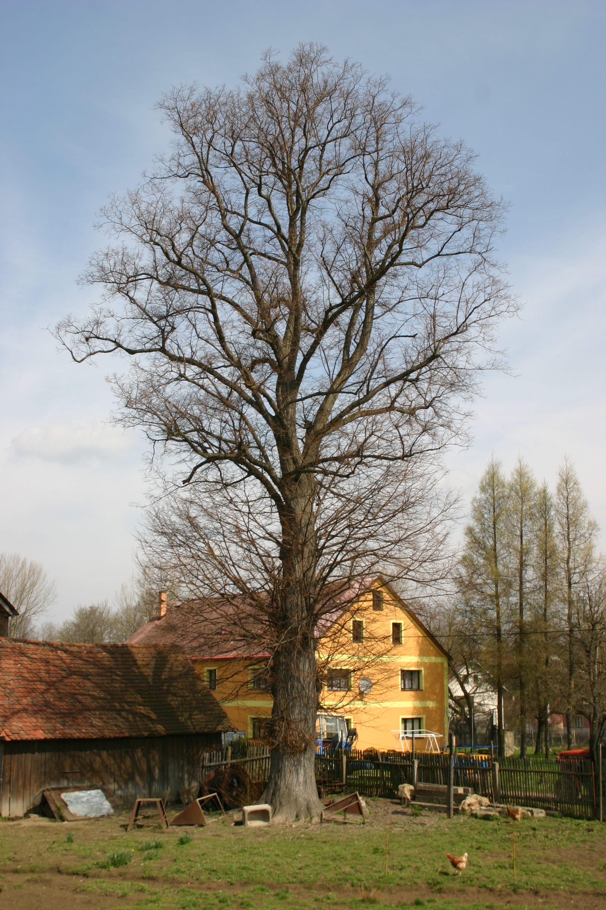 Lípa v Krásném Lese u Čmuchálků - Krásný les